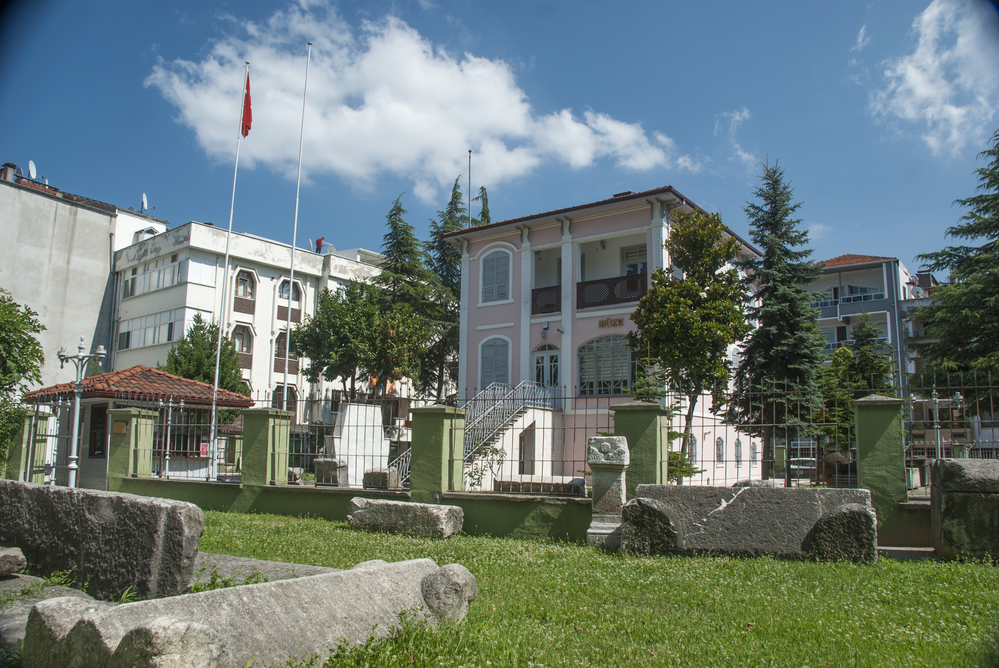 Sakarya müzesi dışarıdan.